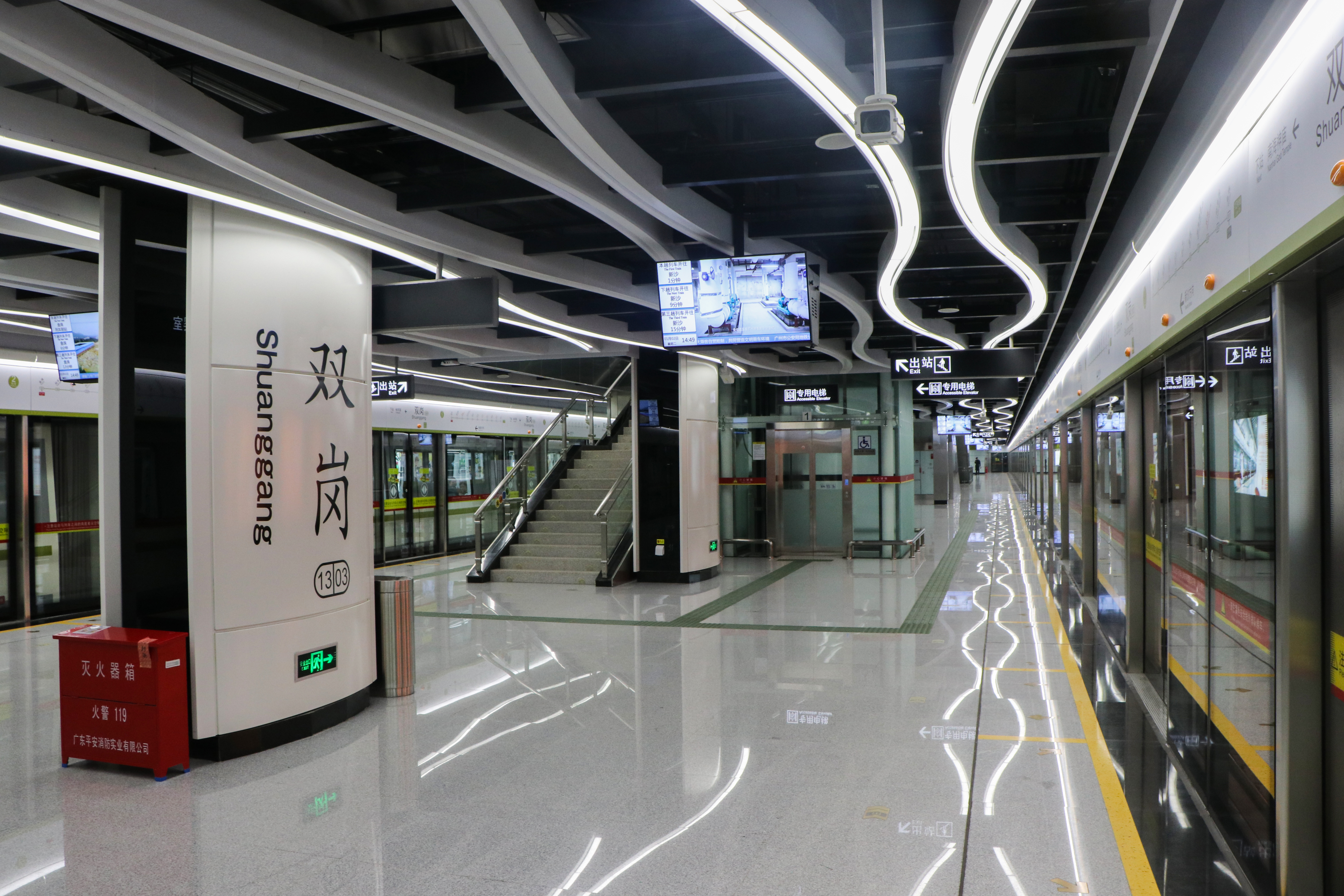 广州地铁双岗站